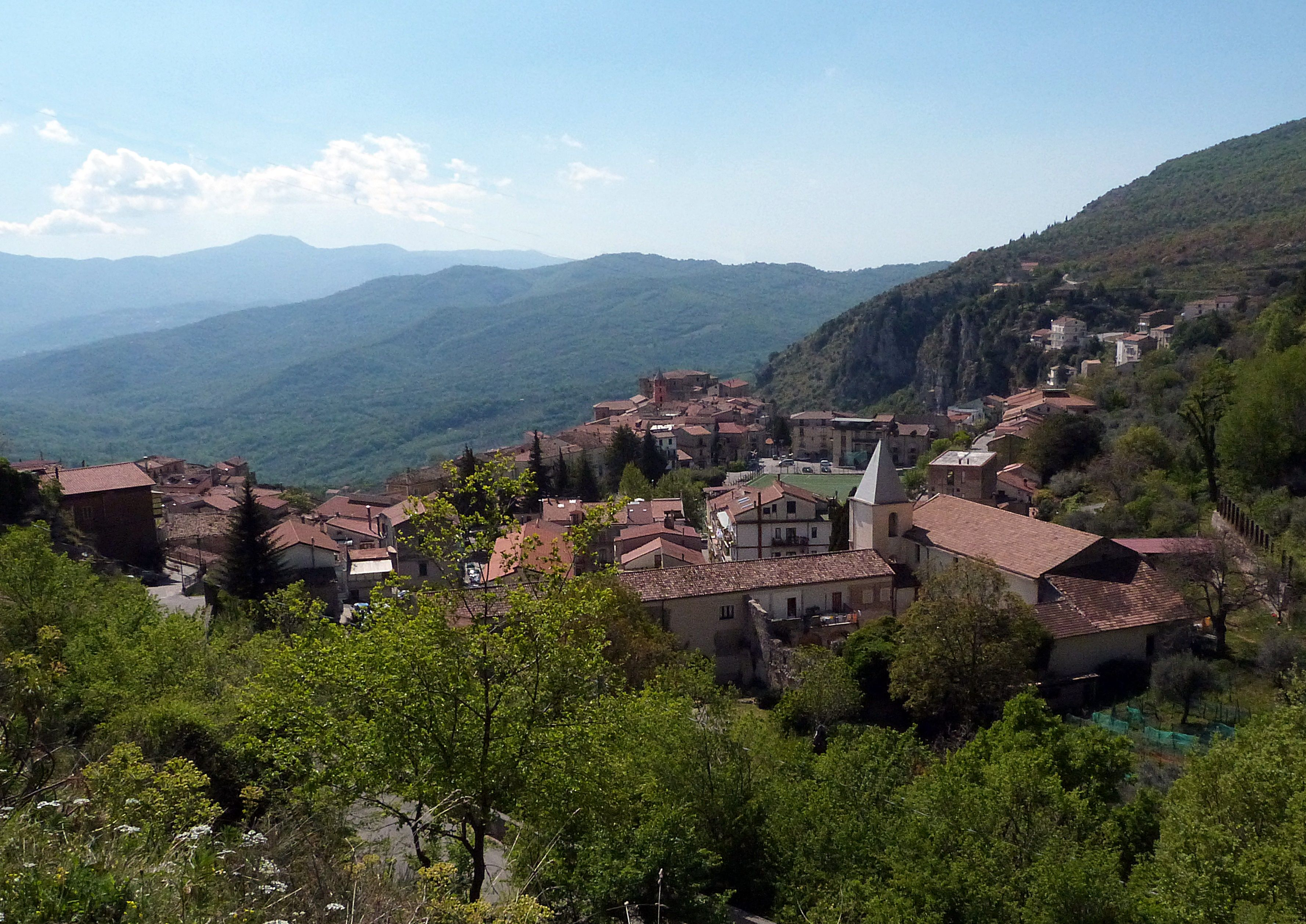 Sant'Angelo a Fasanella